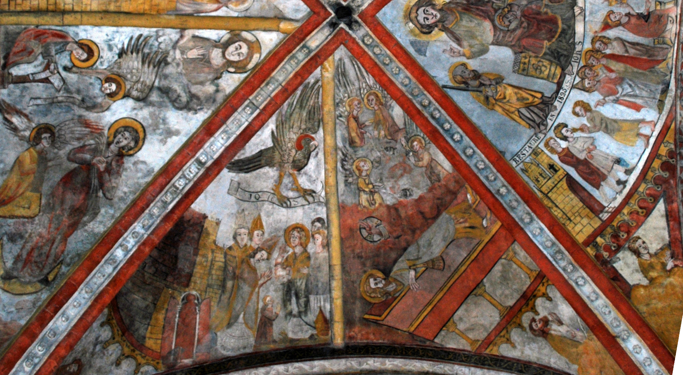 Église Saint-Sauveur de Saint-Macaire